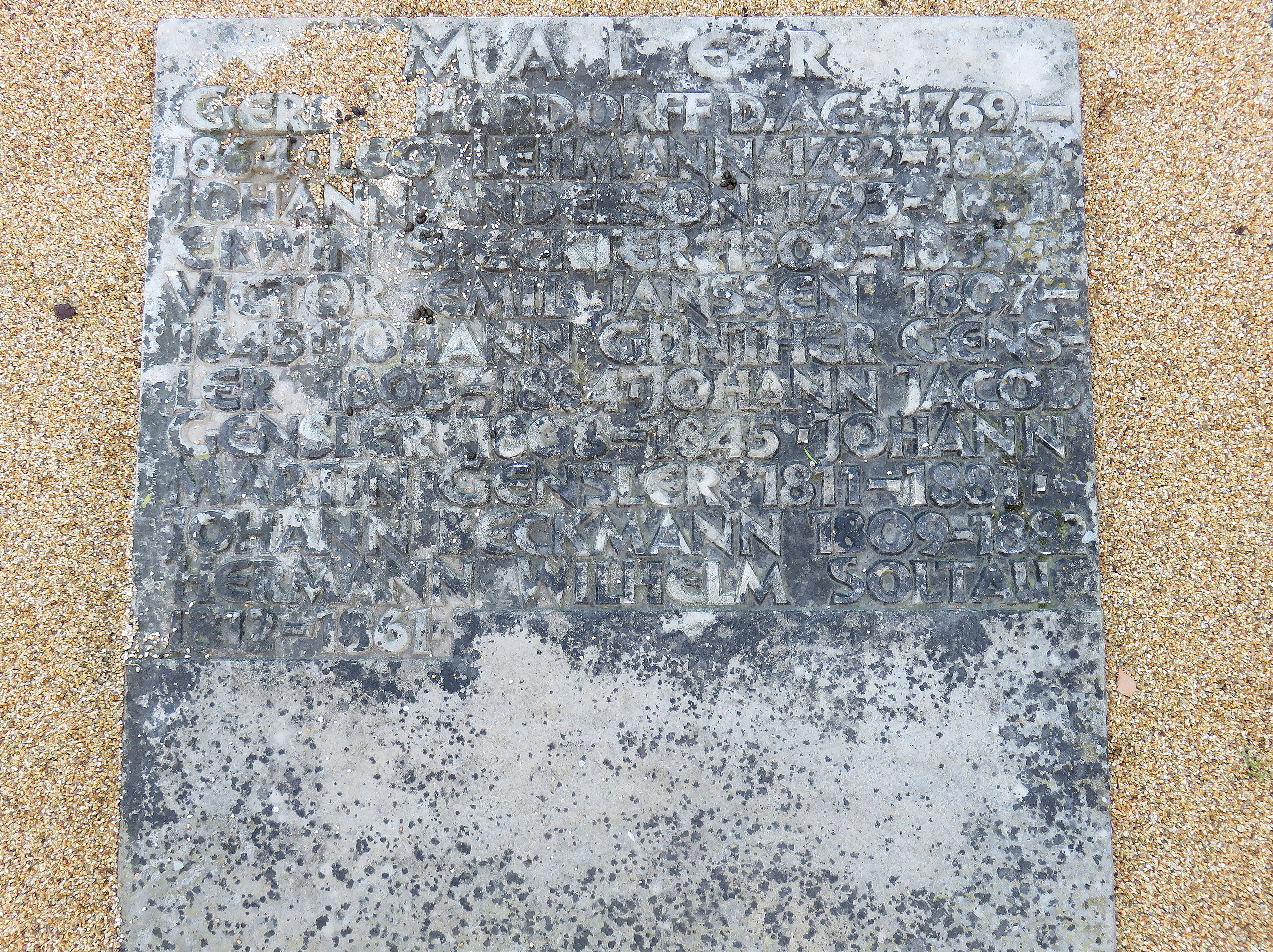 Sammelgrabmal Maler im Bereich des Althamburgischen Gedächtnisfriedhofs auf dem Hamburger Friedhof Ohlsdorf zu Ehren von u. a. Gerdt Hardorff, Leo Lehmann, Erwin Speckter, Victor Emil Janssen, Günther Gensler, Johann Jacob Gensler, Johann Martin Gensler, Hermann Wilhelm Soltau.